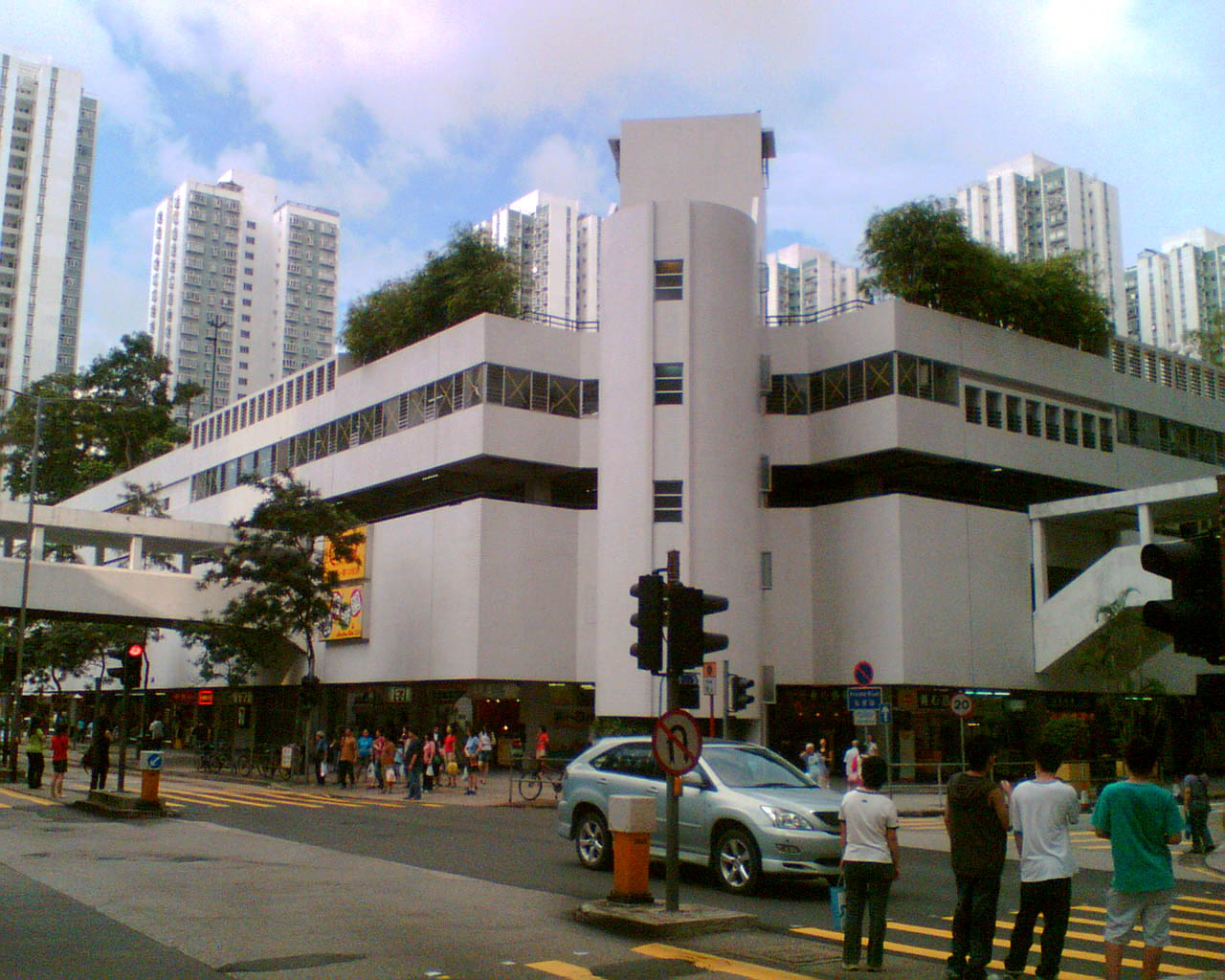 沙田第一城中心